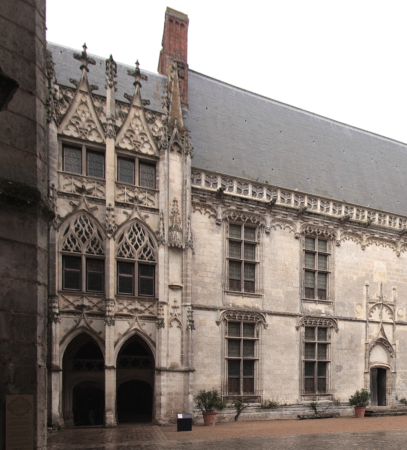 Château de Châteaudun, Département Eure-et-Loir/Frankreich - Gotische Treppe als Abschluss des Dunois-Flügels mit anschließem Longueville-Flügel der Renaissance